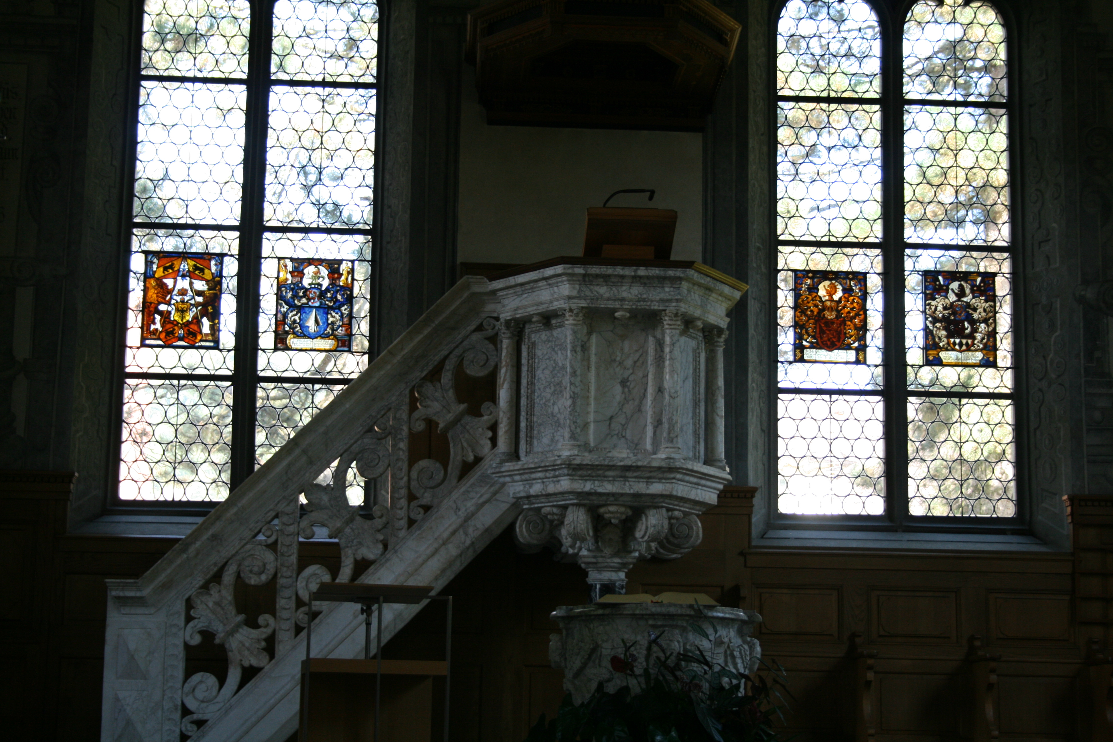 Kanzel und Fenster mit Wappenscheiben, Reformierte Kirche Gränichen